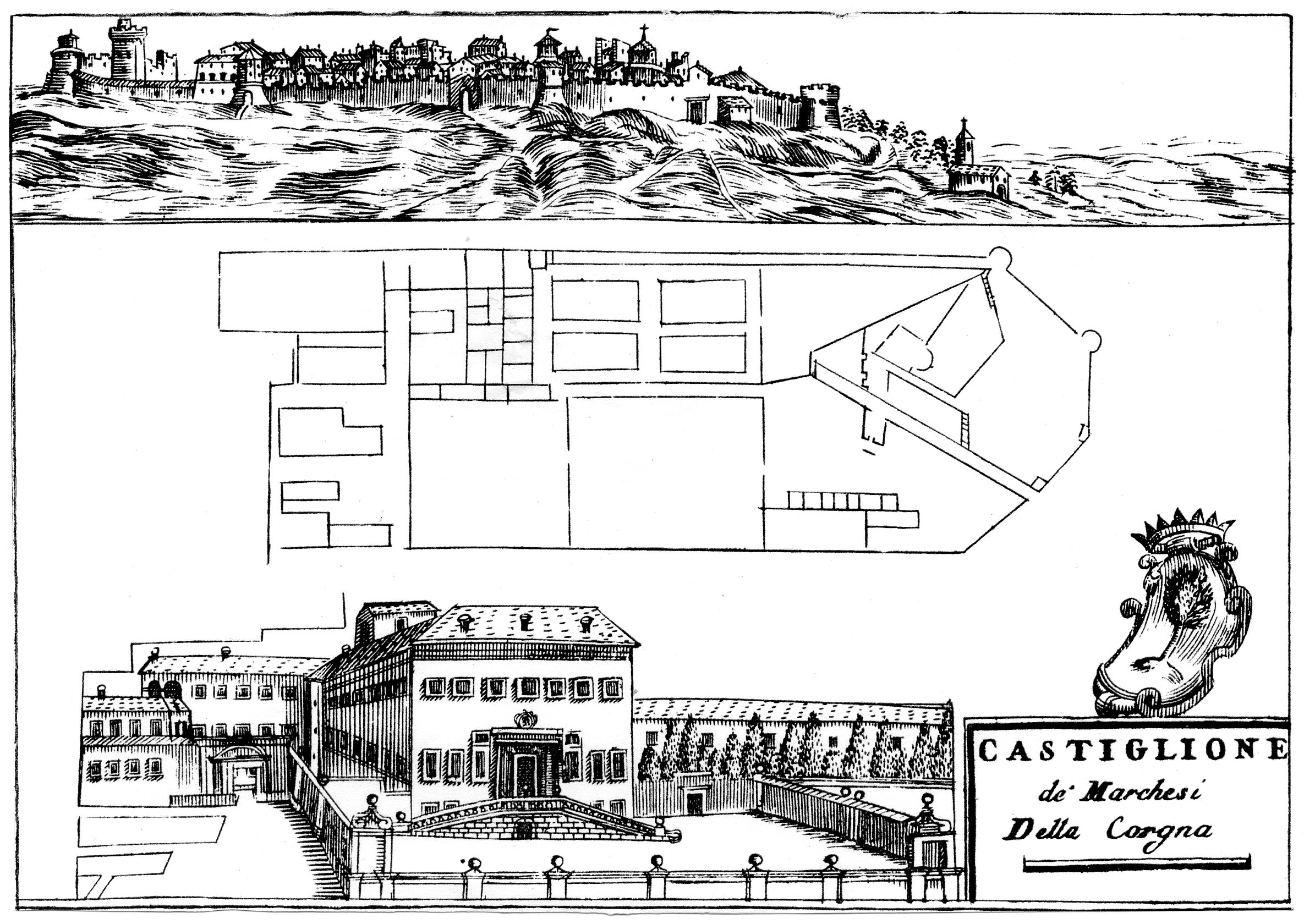 prospetto di Castiglione del Lago e Palazzo ducale